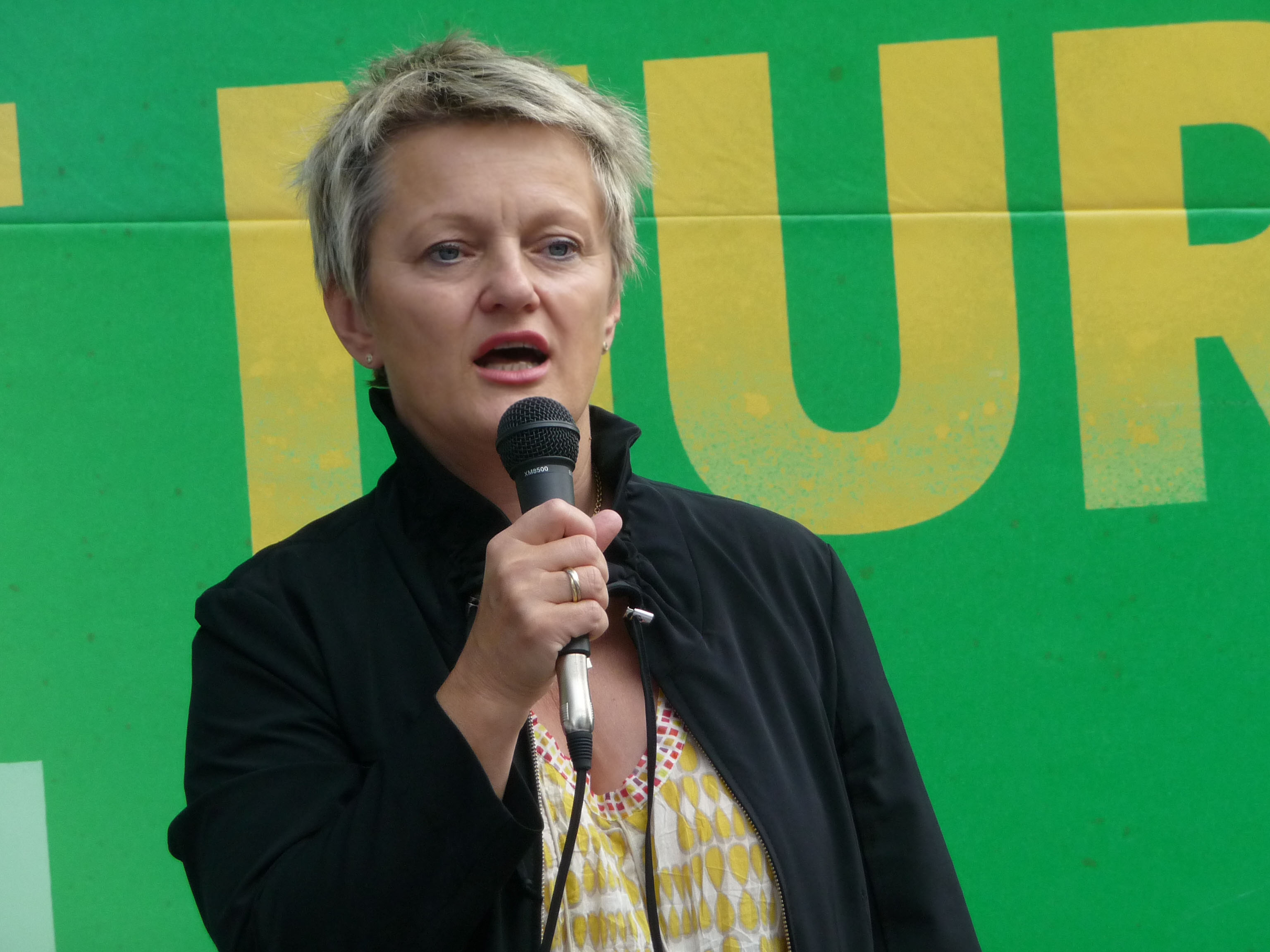 Renate Künast, Veranstaltung zum Bundestagswahlkampf 2009 am Wittenbergplatz, Berlin